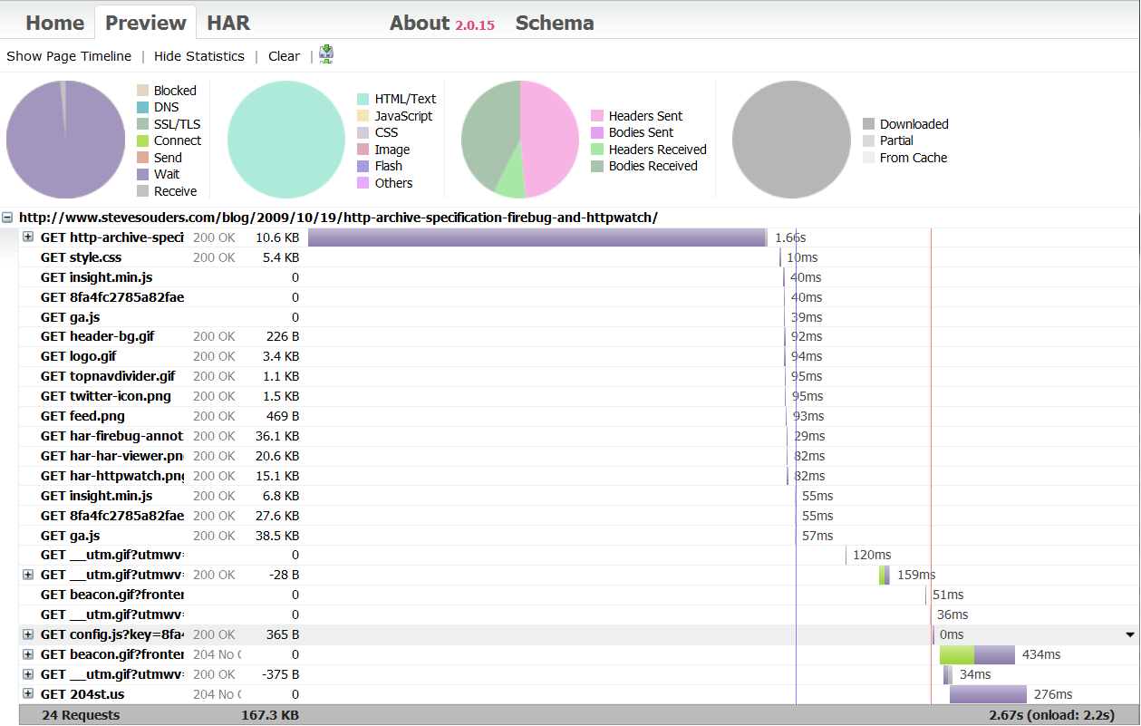 Exemple de restitution d'un fichier au format HTTP Archive .har avec un logiciel de visualisation